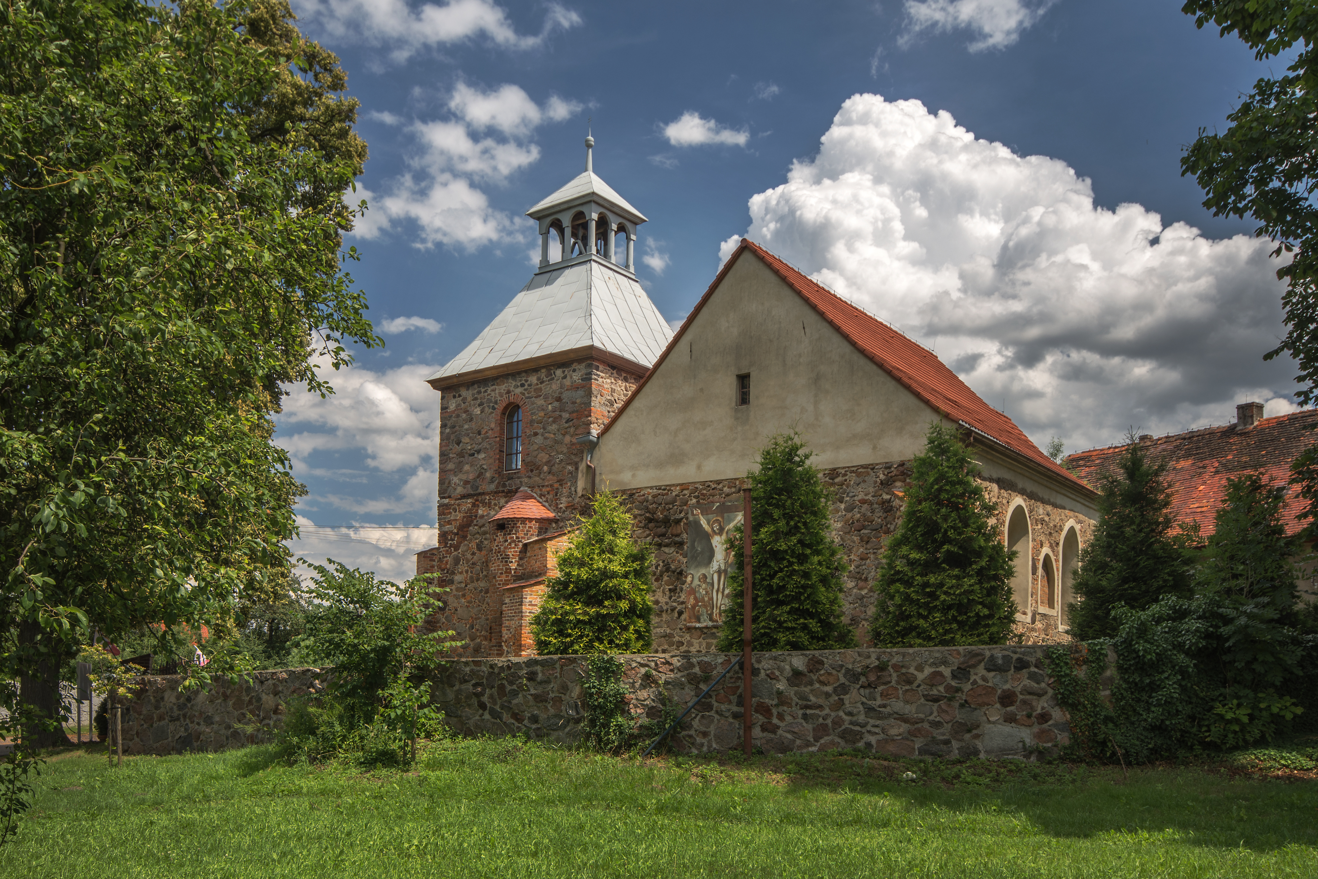 Jerzmanowa, kościół fil. p.w. Wszystkich Świętych, XIV, XIX